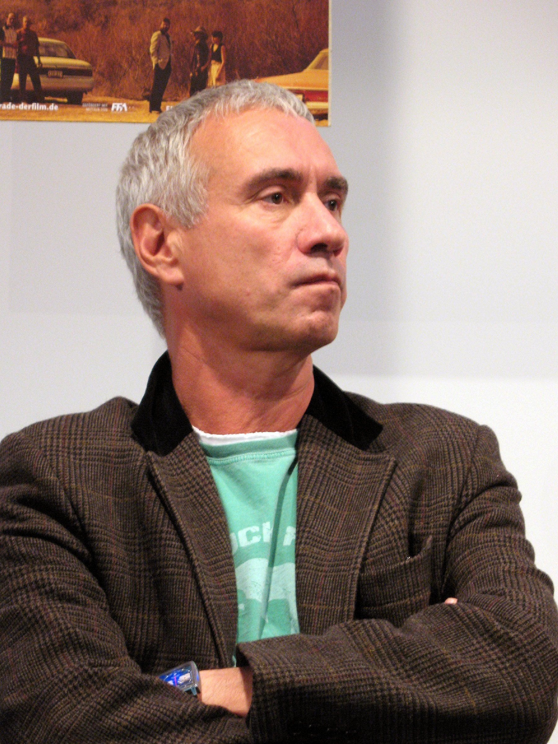 Roland Emmerich bei der Pressekonferenz zur deutschen Filmpremiere Trade, Berlin, 11.10.2007